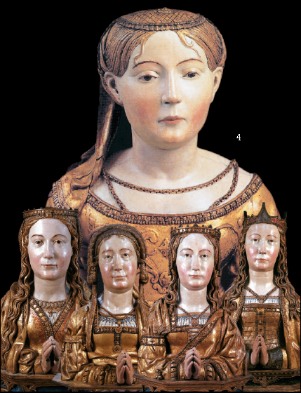 "Santa Urtsula eta lau birjina lagun" soin-erlikia